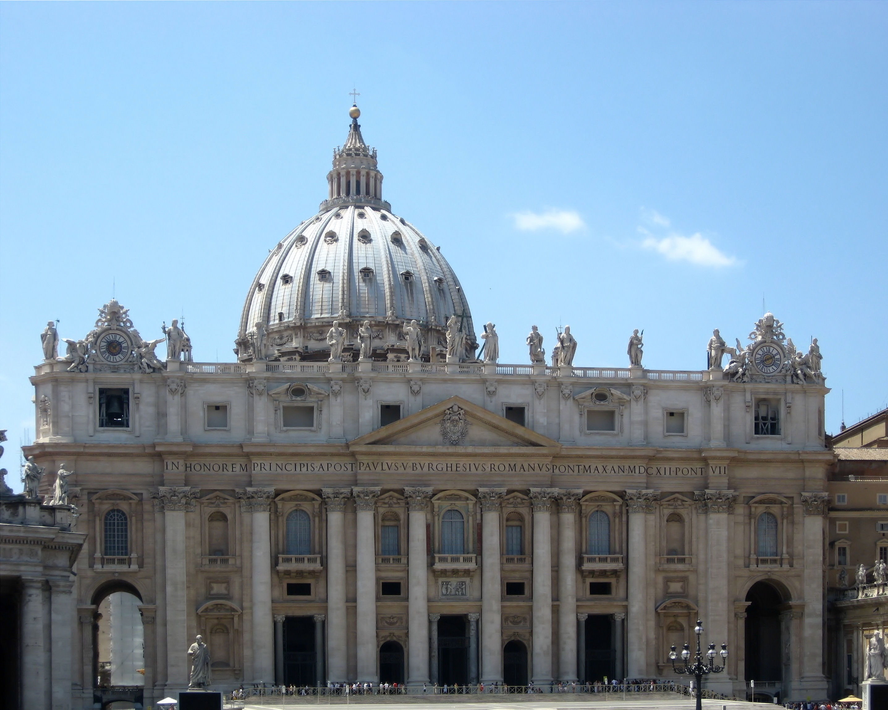 Basilica di San Pietro